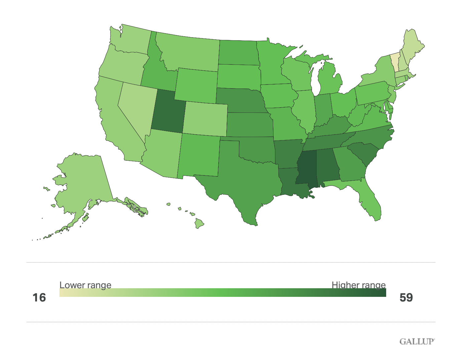 Карта ранжирования наиболее религиозных (very religious) штатов в США